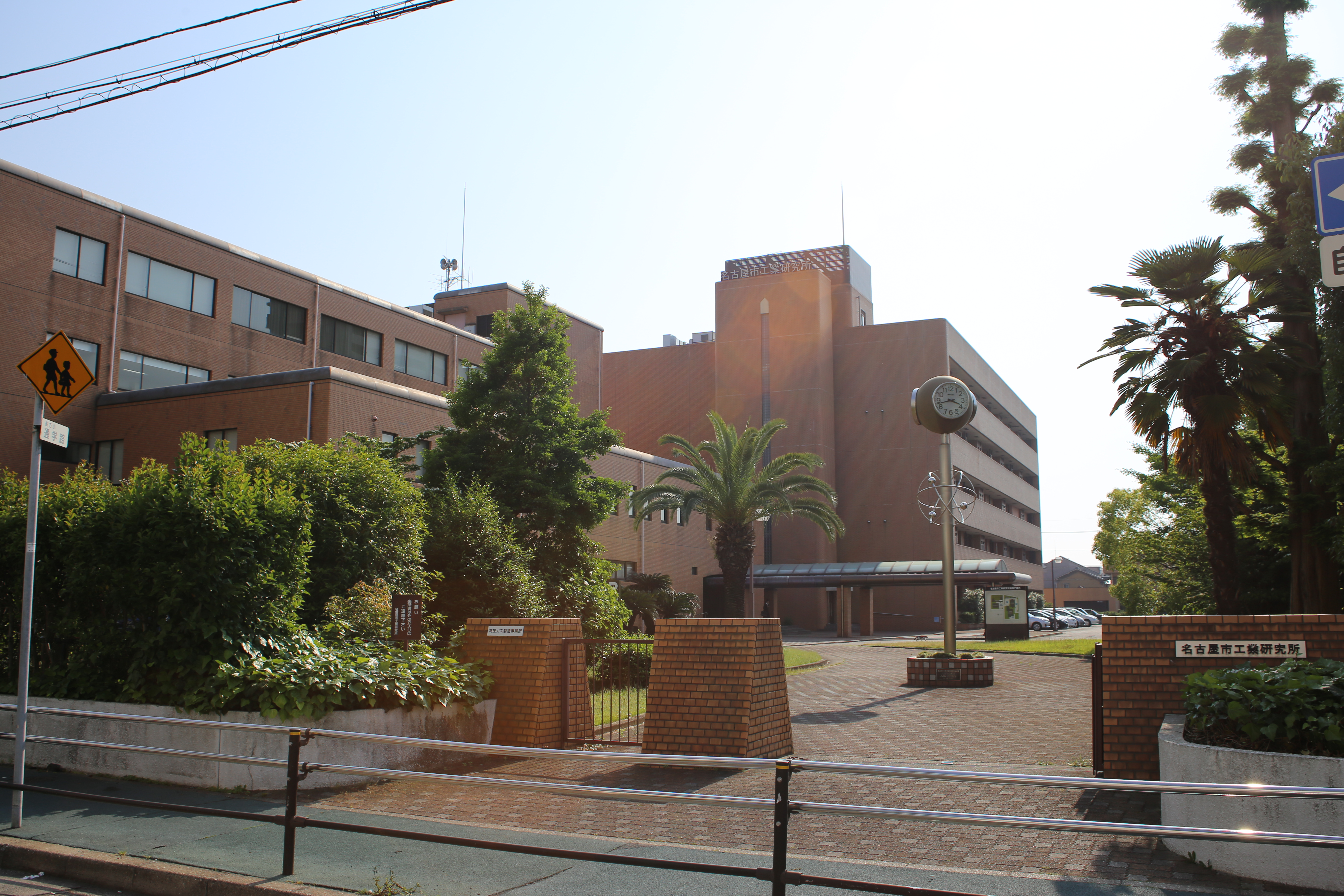 名古屋市熱田区六番三丁目の名古屋市工業研究所を東側公道北側より撮影